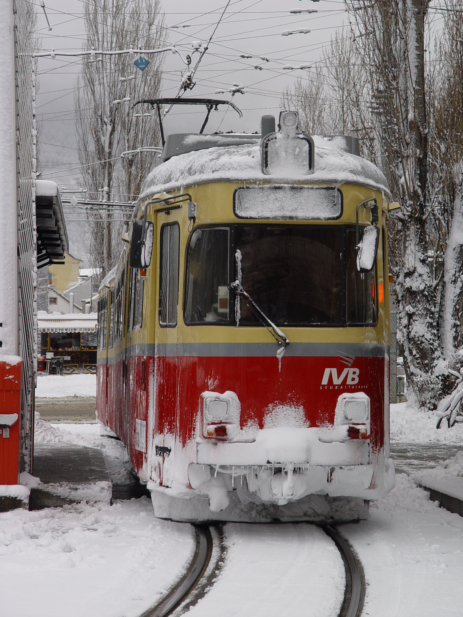 Die Stubaitalbahn hat seit jeher mit der Natur zu kämpfen gehabt.